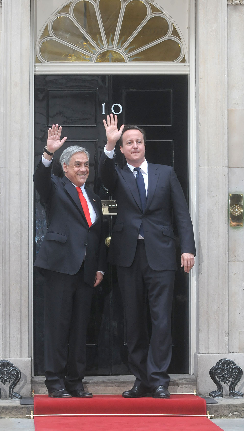 El Presidente de Chile Sebastián Piñera en reunión con el Primer Ministro del Reino Unido, David Cameron